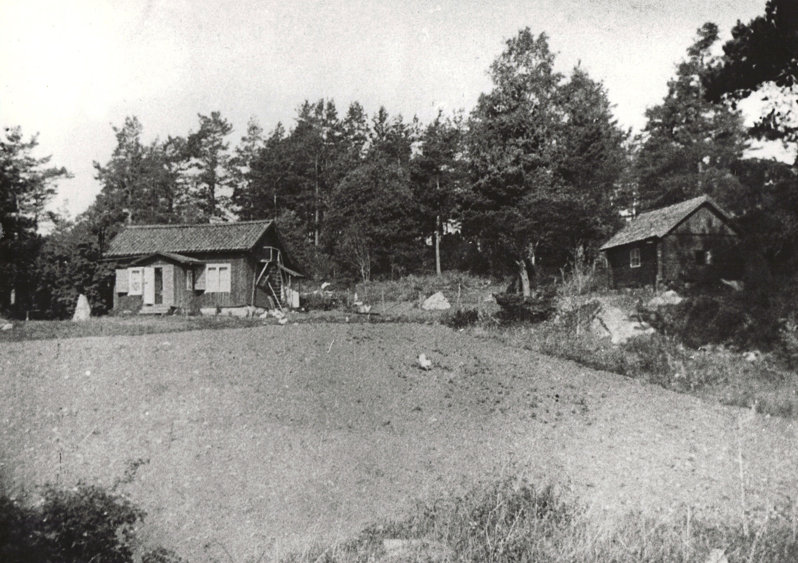 Lilla Lideby (revs på 1920-talet)